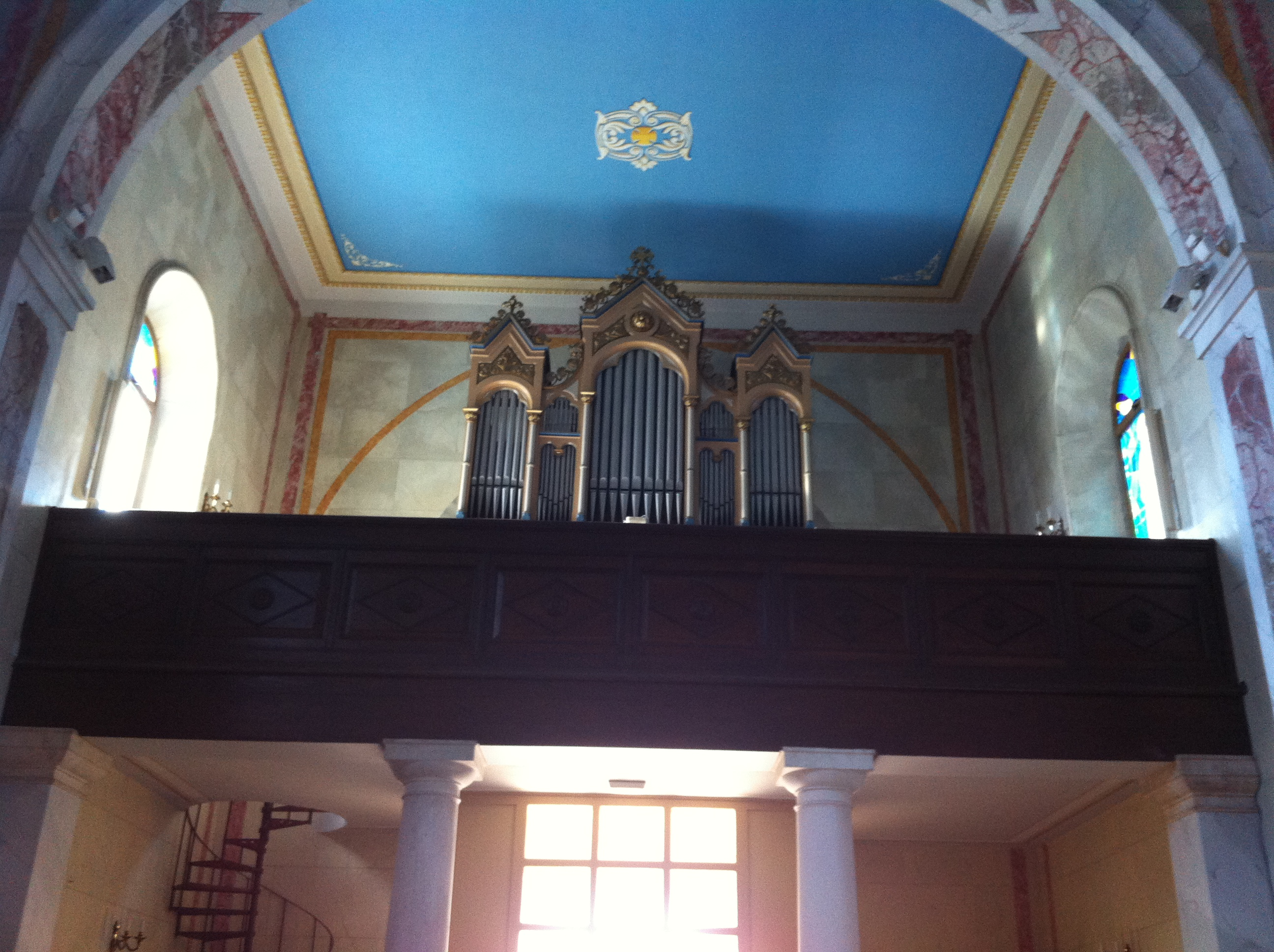 Orgulje